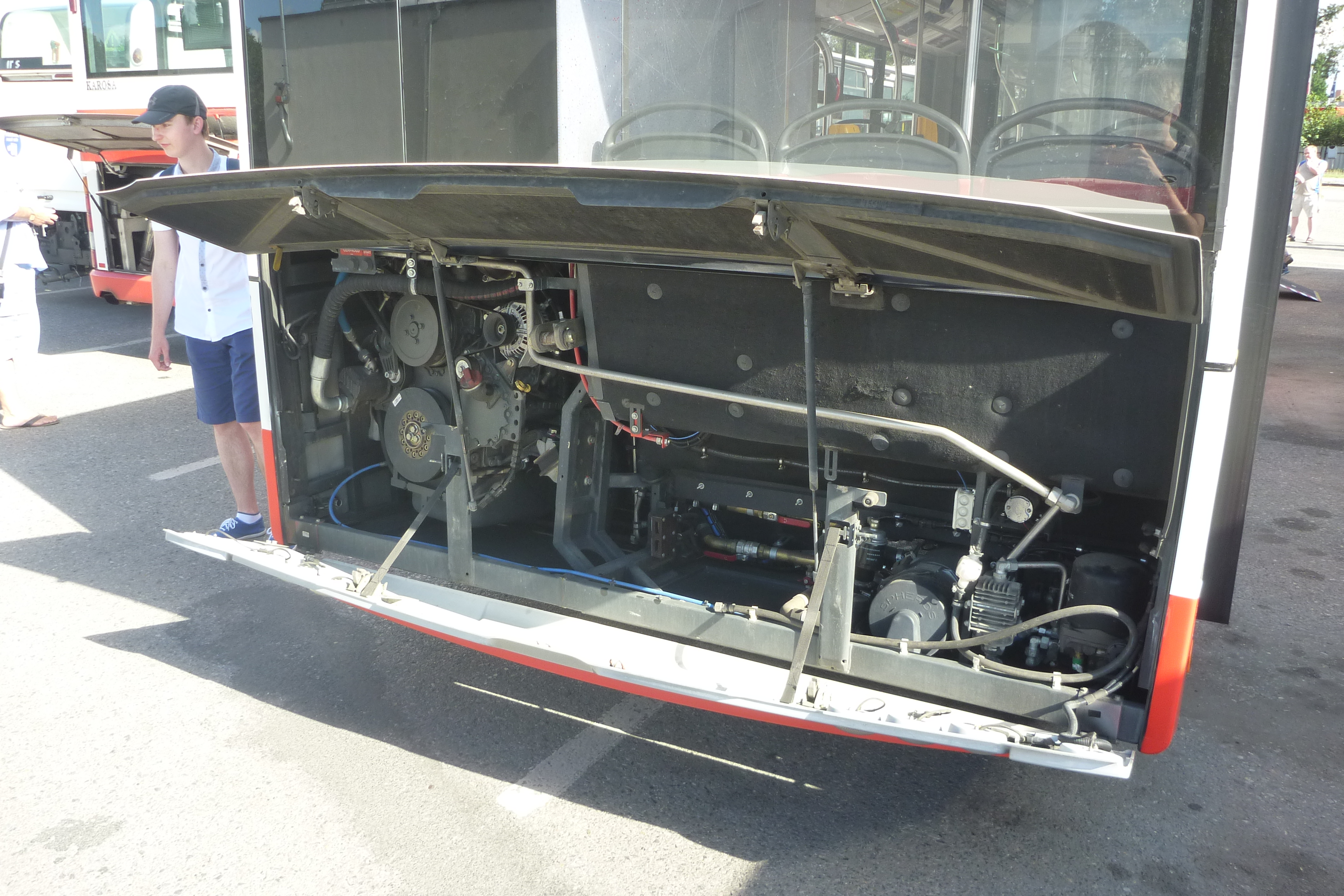 Autobusy na odstavné ploše vozovny